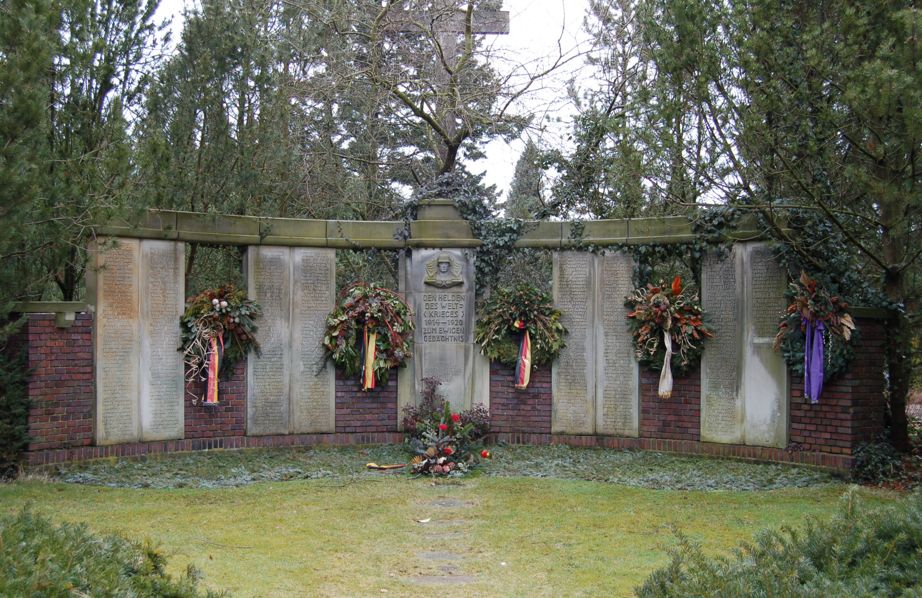 Gedenkstätte an die Gefallenen Soldaten aus Uetersen im Ersten Weltkrieg (1914-1920).